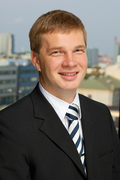 Tõnis Tüür (2010)